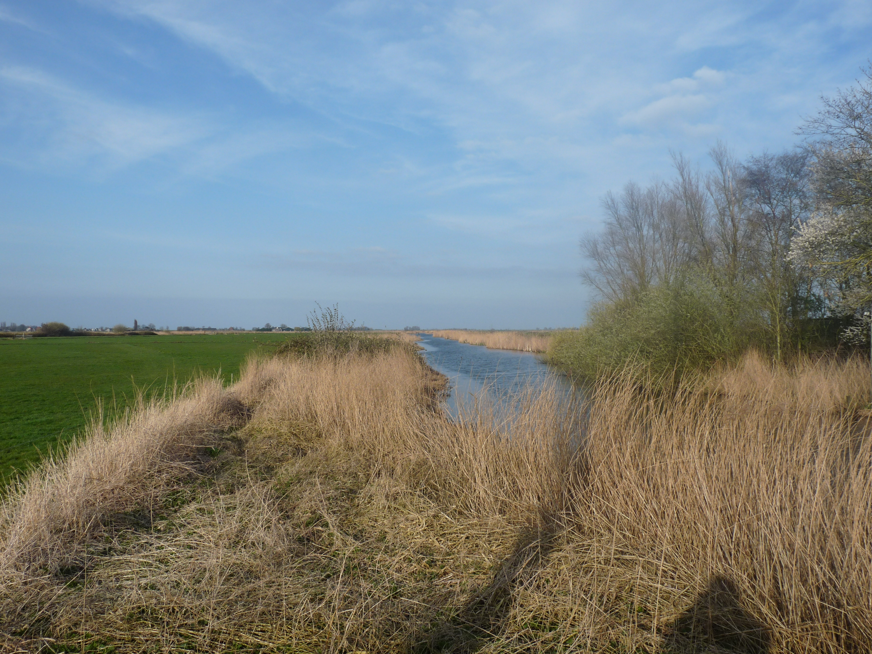 Holysloot, Een restant van de nooit voltooide Goudriaankanaal.